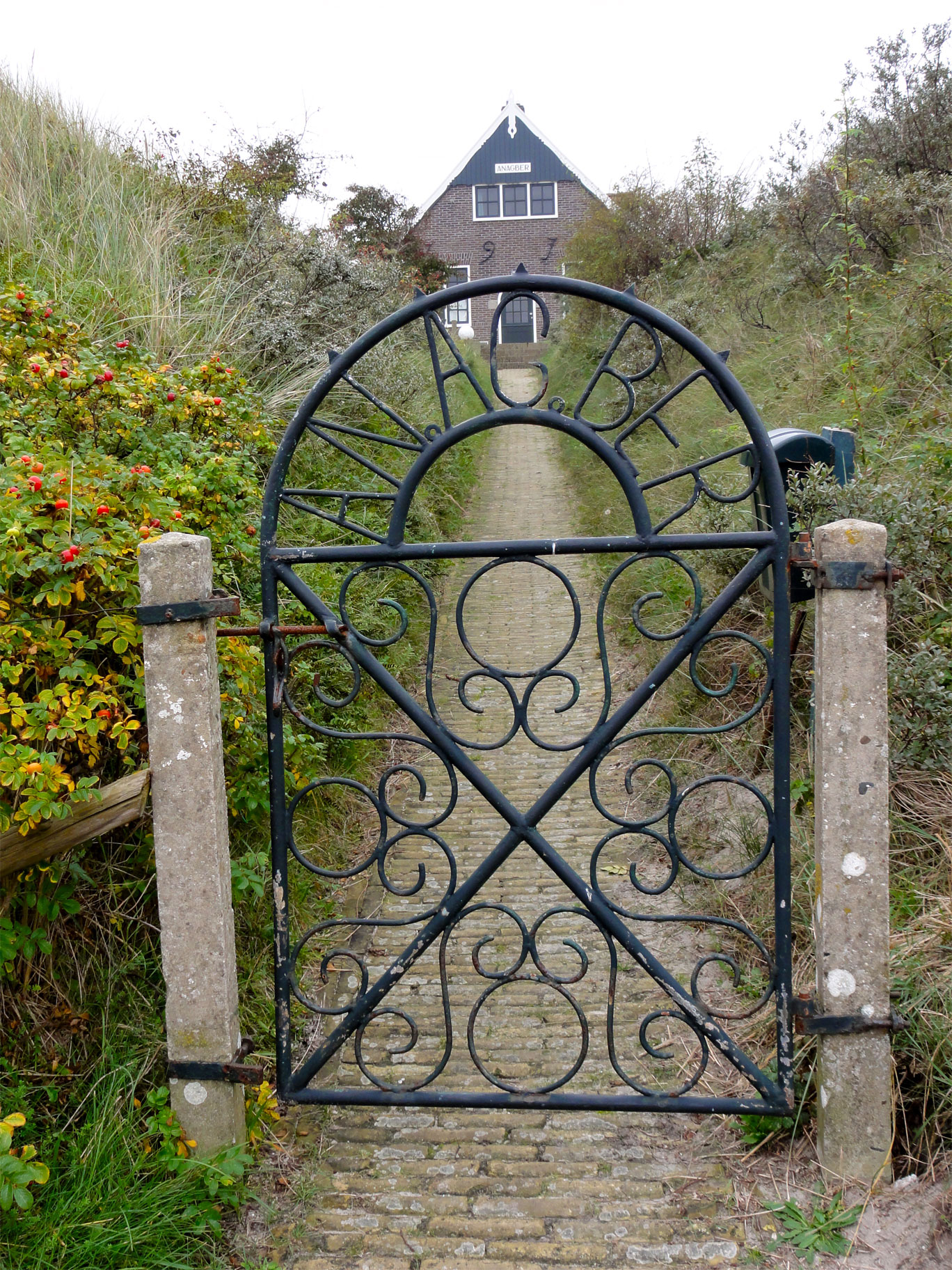 Anagber Badweg 115 in Schiermonnikoog